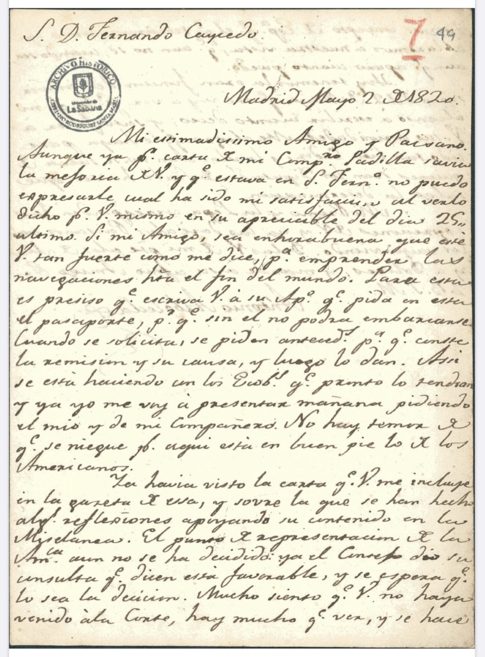 Carta del prócer colombiano Antonio Arboleda y Arrachea